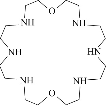 Макроцикл [24]-N6O2